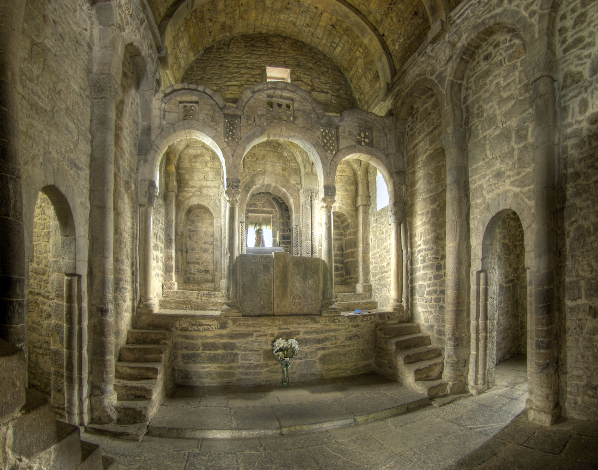 Iglesia prerrománica construida en el siglo IX (año 852). Está en la parroquia de Felgueras, concejo de Lena (Asturias, España). En esta vista interior puede verse el nártex y el iconostasio, así como las entradas a las dos capillas laterales.